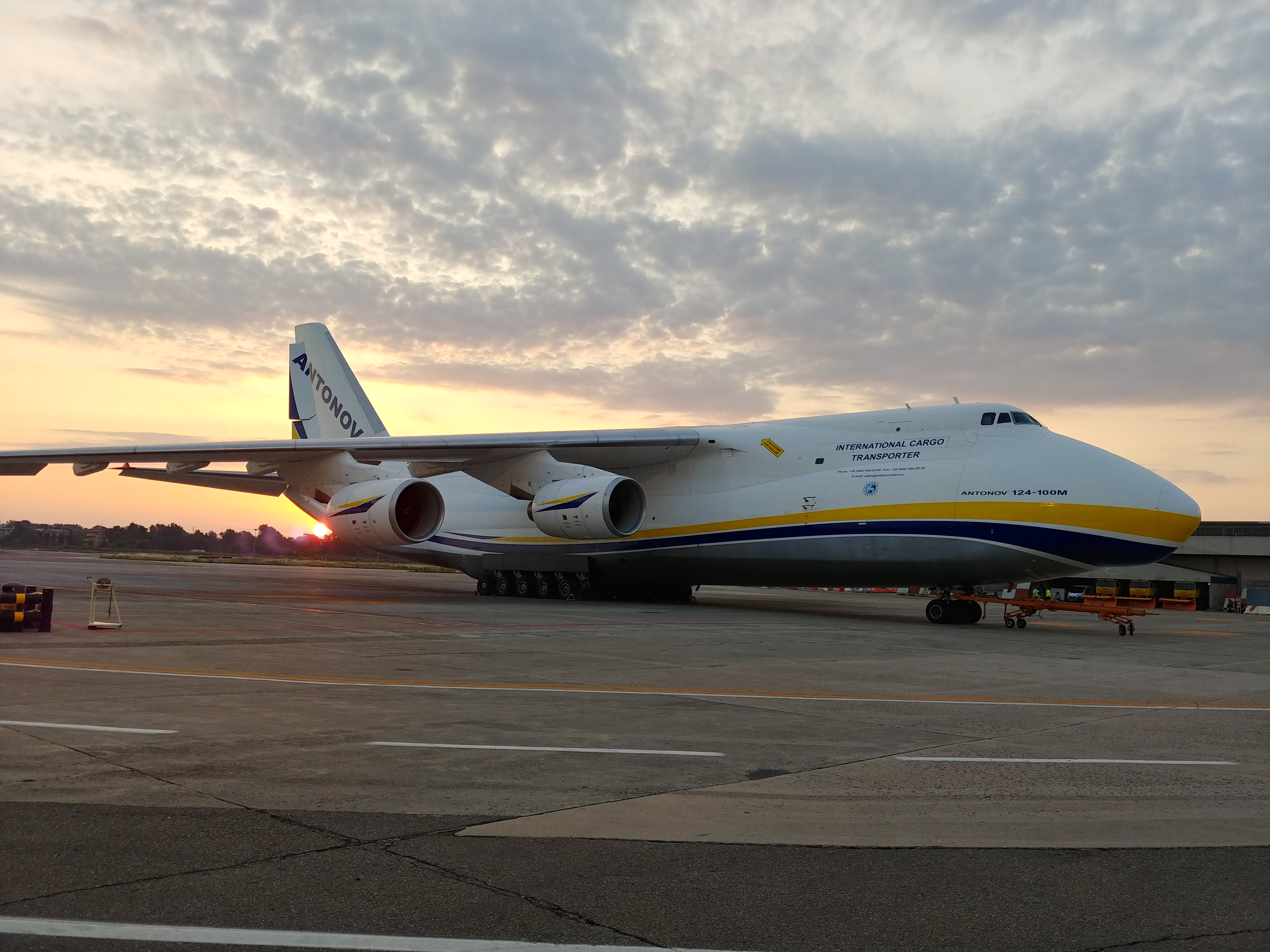 Un Antonov 124 in sosta